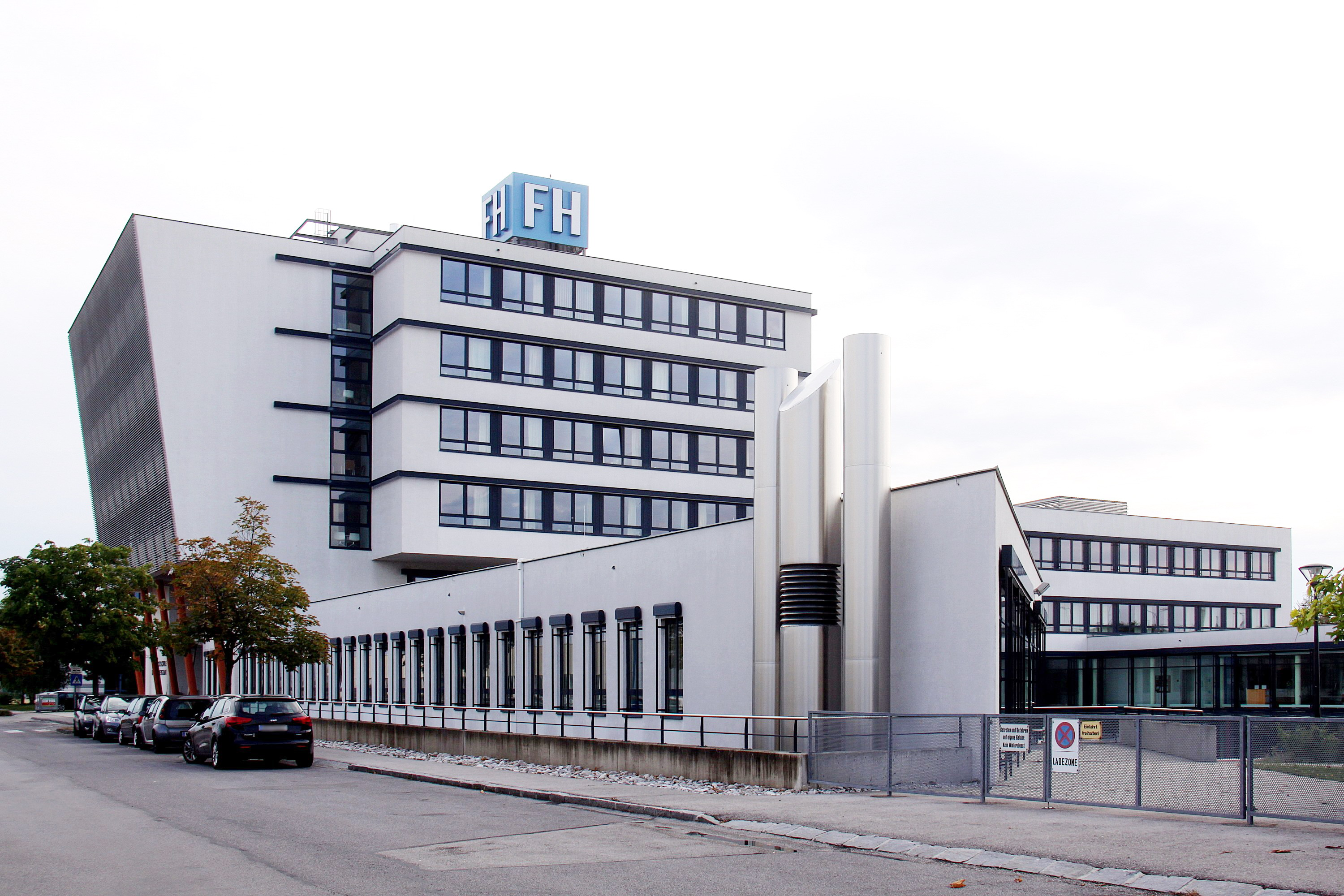 Fachhochschule in Wiener Neustadt, Hauptgebäude